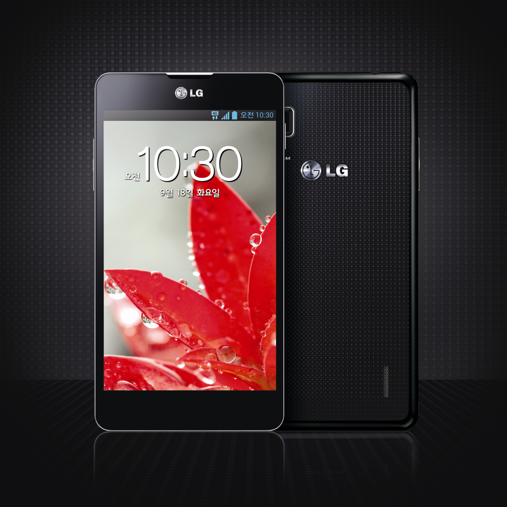 LG 옵티머스 G